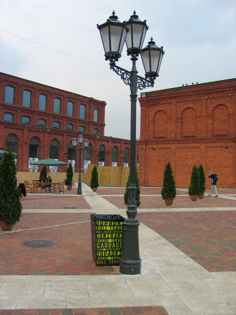 Centrum Manufaktura